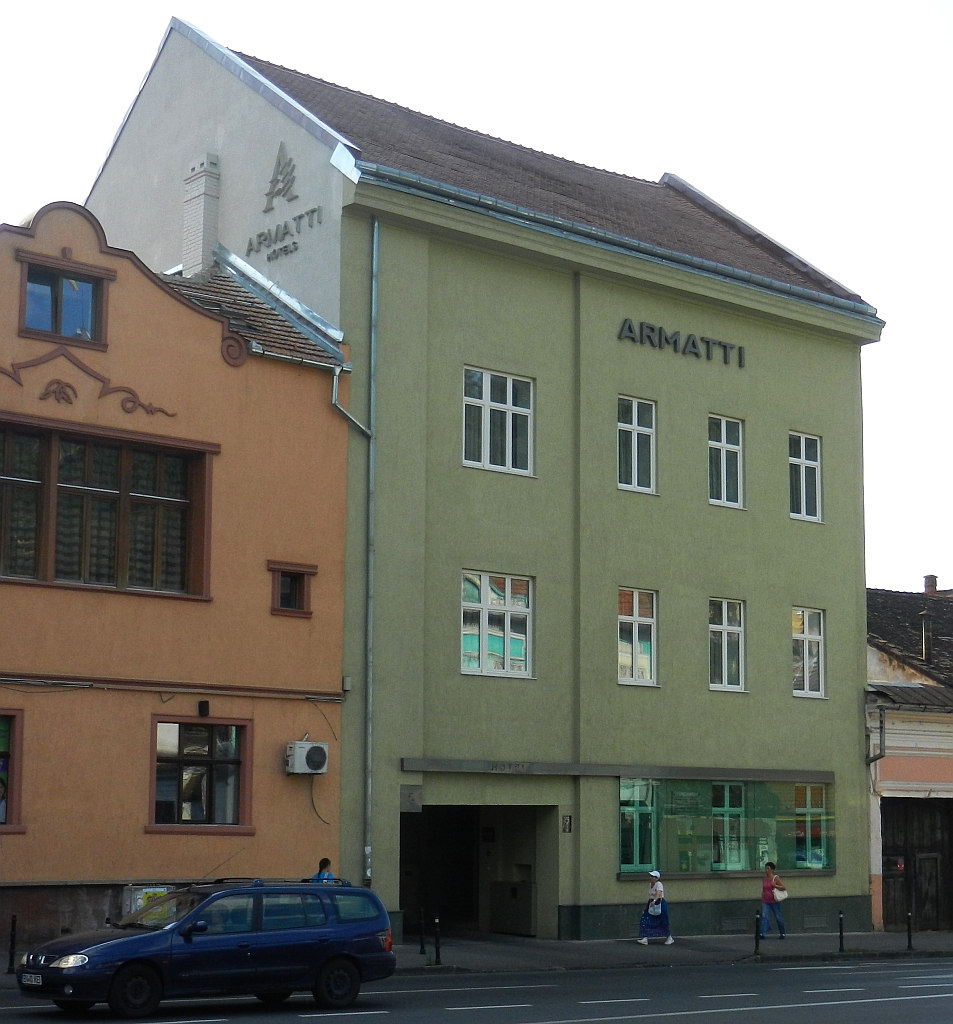 Fostul hotel „București”